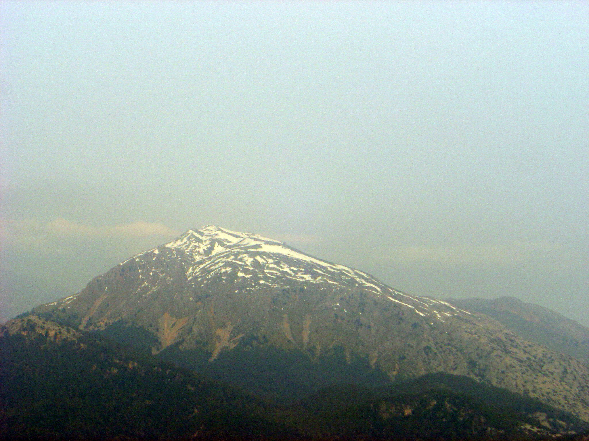 El Puig Tomir nevat, vist des del Puig de n'Alí. Escorca. Mallorca.